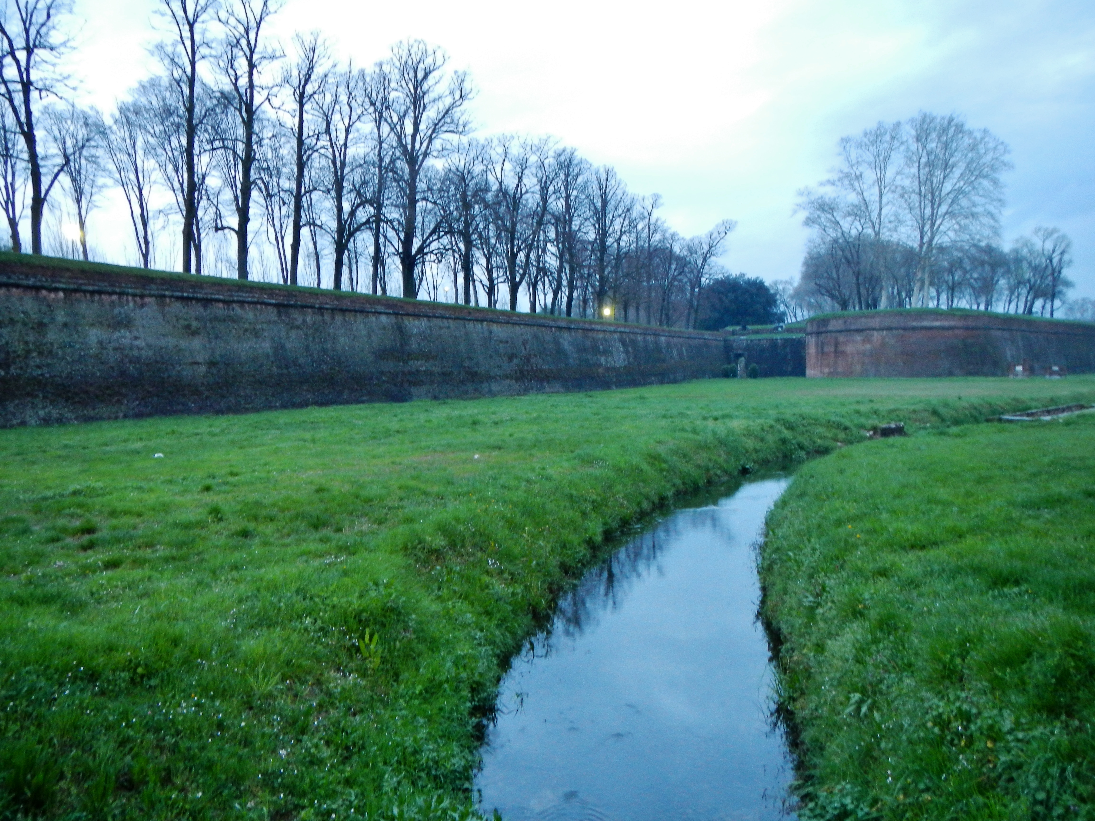 Stadtmauer um Lucca - Mura di Lucca